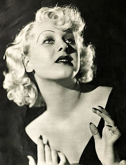 Hazel Forbes